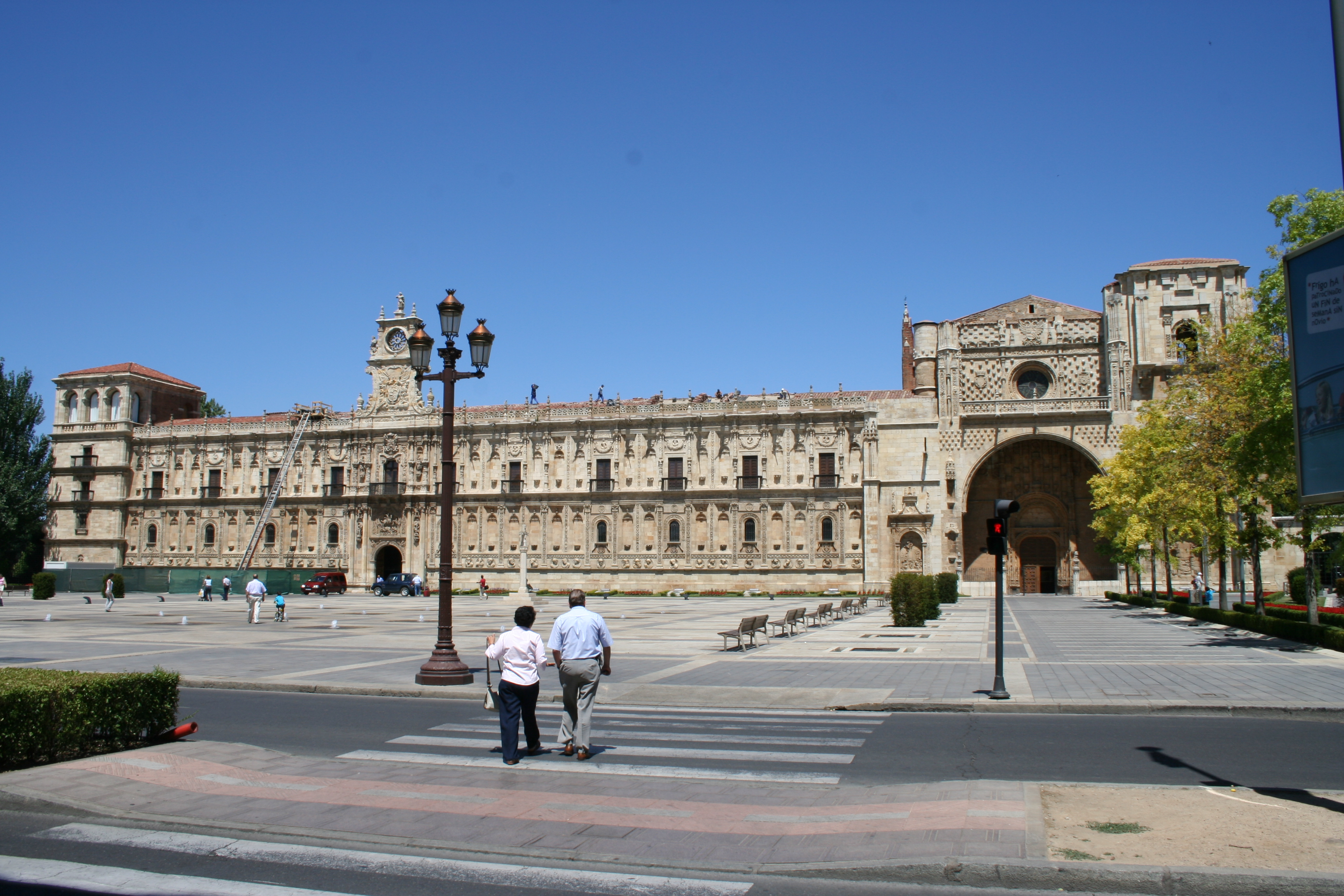 Fachada del Hostal de San Marcos.